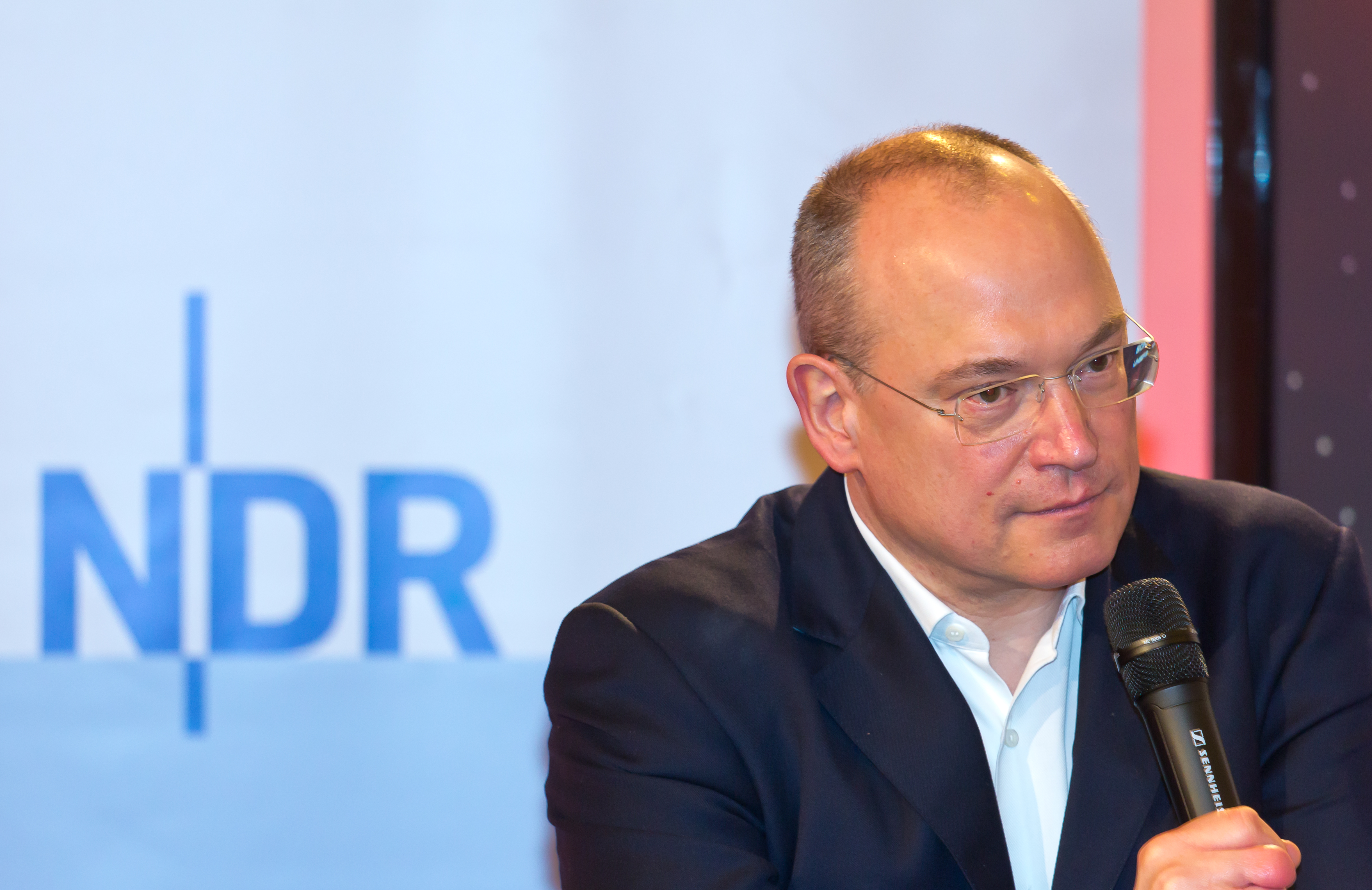 Pressekonferenz am 2. Probentrag von "Unser Song für Dänemark" mit allen 8 Acts Foto: Thomas Schreiber vom NDR